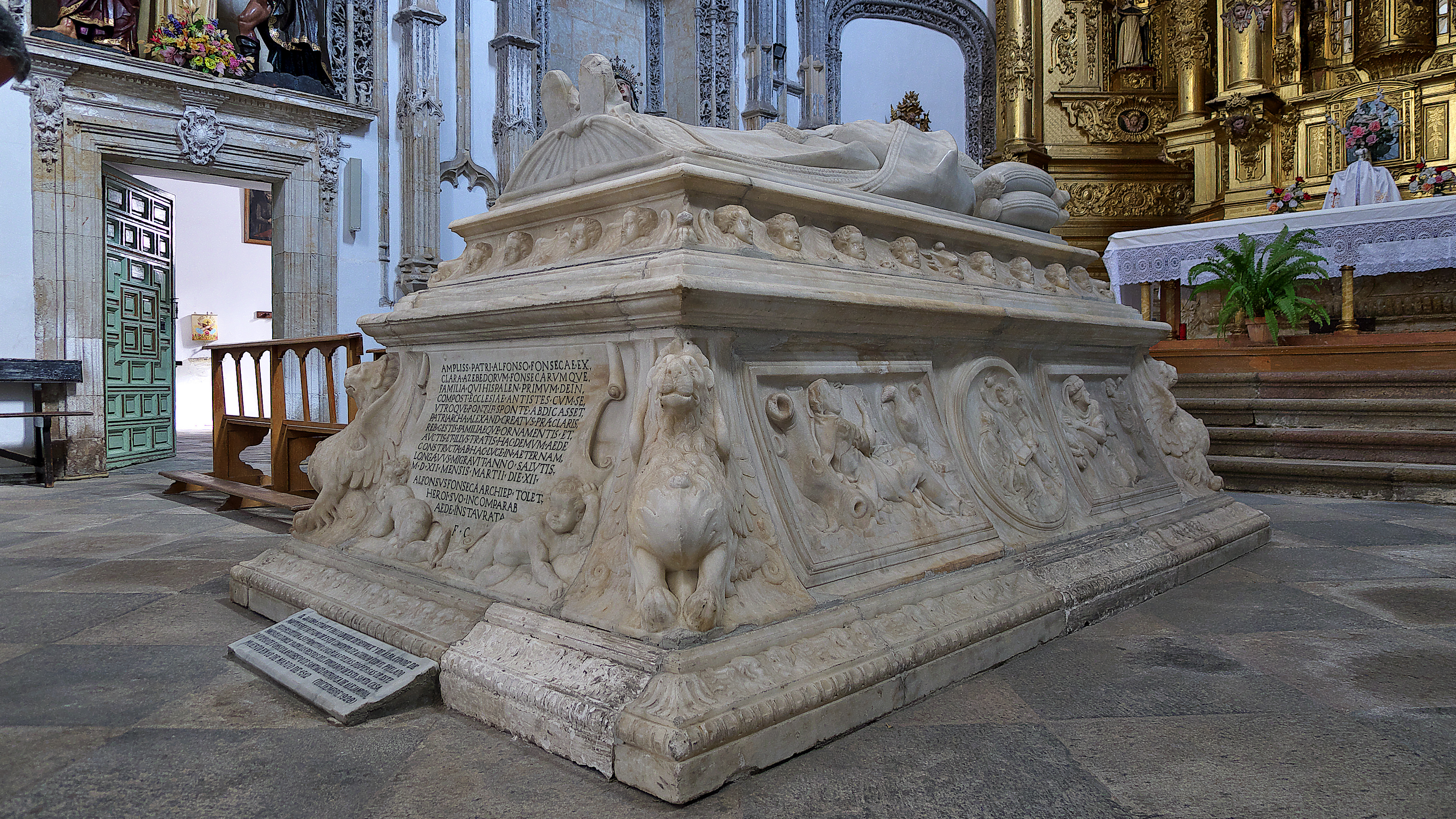 Convento de la Anunciación (Salamanca). Sepulcro de Alonso de Fonseca y Acevedo (†1512), Arzobispo de Santiago, magníficamente realizado en mármol blanco por Diego de Siloé (1529).